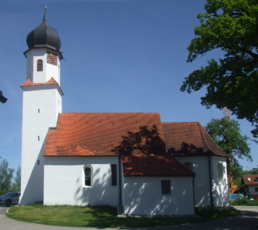 Leonhardikapelle Börwang, Gemeinde Haldenwang, Landkreis Oberallgäu